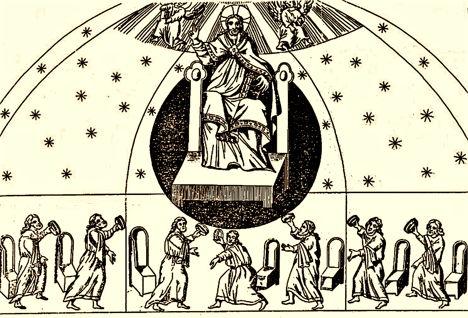 Chapelle palatine d'Aix-la-Chapelle, Dessin de la mosaïque (image du domaine publc (Ciampini) modifiée)